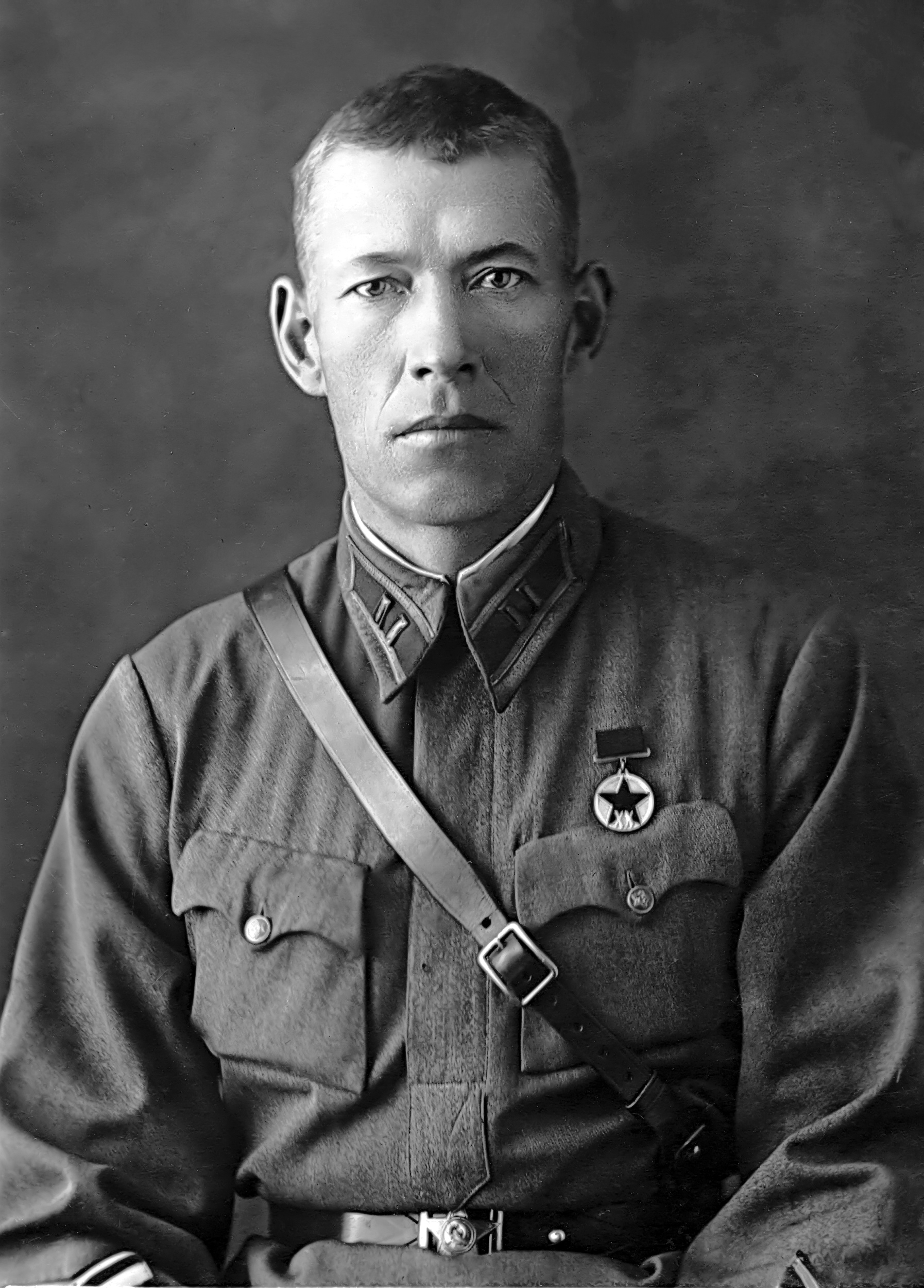 Василий Александрович Болвинов (1902—1942) — советский военачальник. Во время Великой Отечественной войны командир 149-й отдельной стрелковой бригады, отличившейся в обороне Сталинграда. Подполковник.